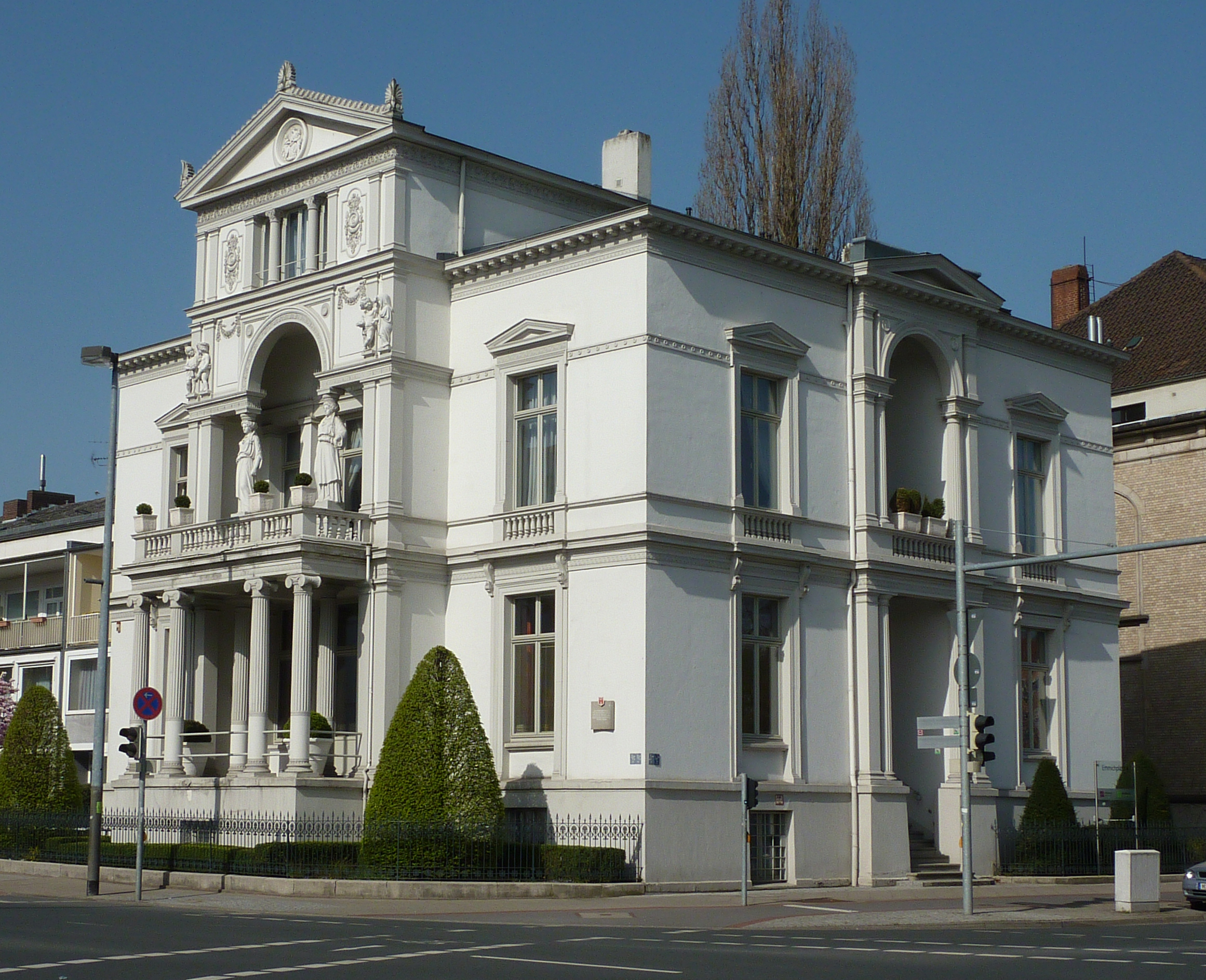 Emmichplatz 4 in der Oststadt, Hannover